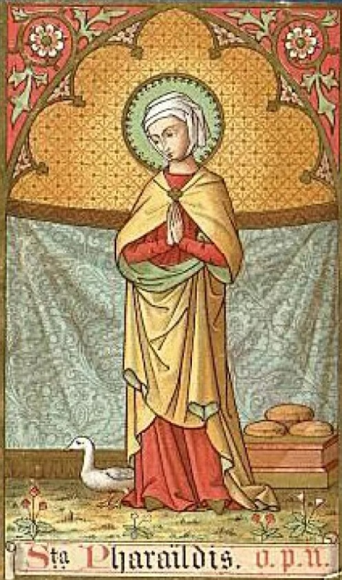 Sankt Pharaildis (Veerhilde, Veerle), Patronin von Gent, Wandmalerei, 19. Jahrhundert